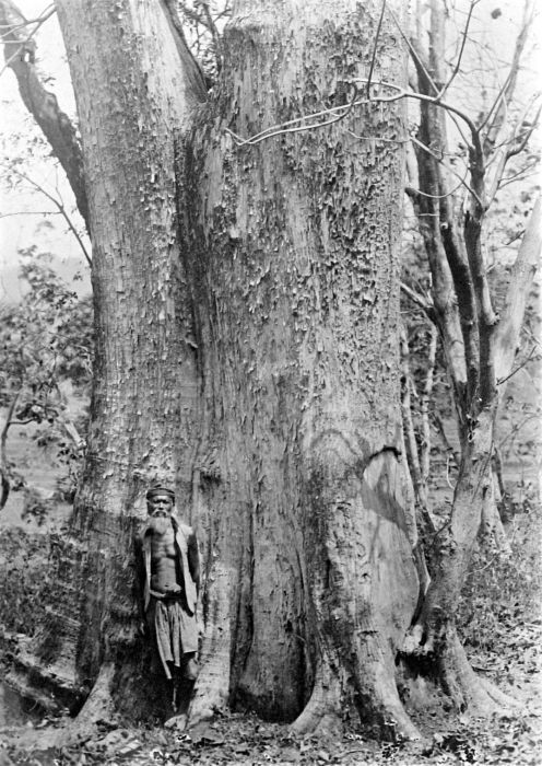 Repronegatief. Oude djati-bomen, Bodjonegoro, Midden Java